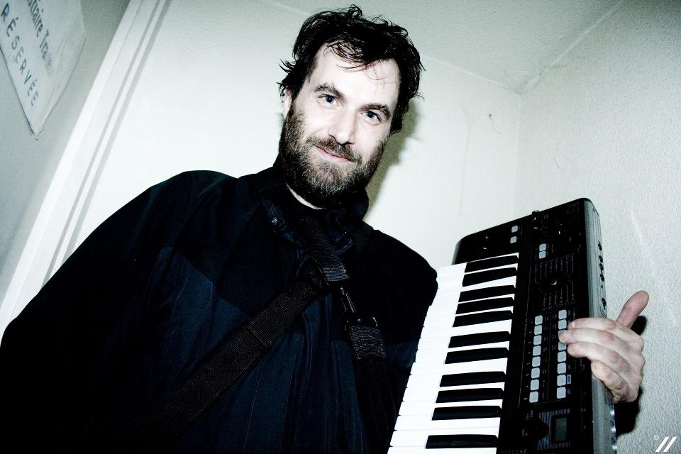 Guillaume Atlan, membre du groupe français The Supermen Lovers